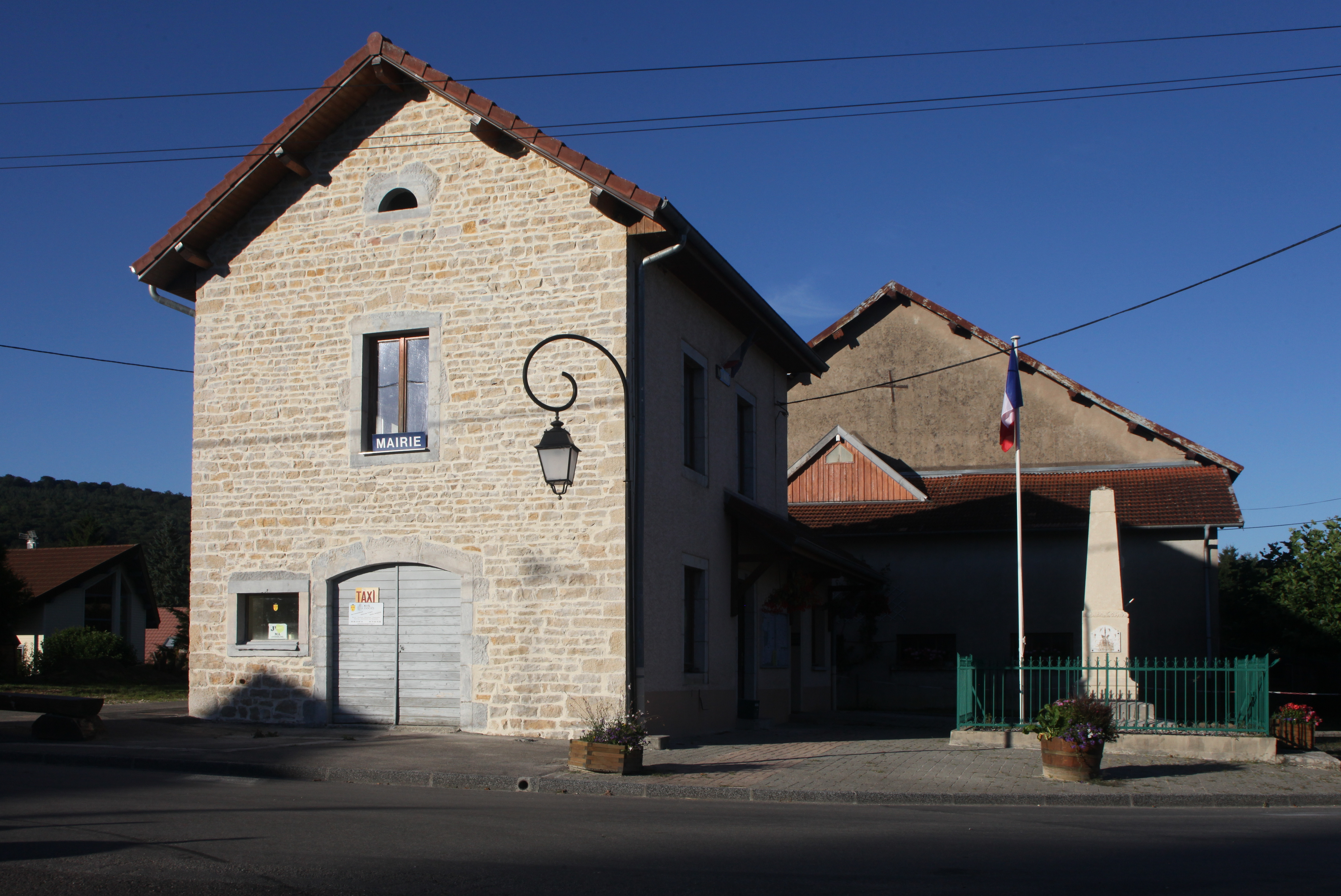 Mairie de Champlive (Doubs).